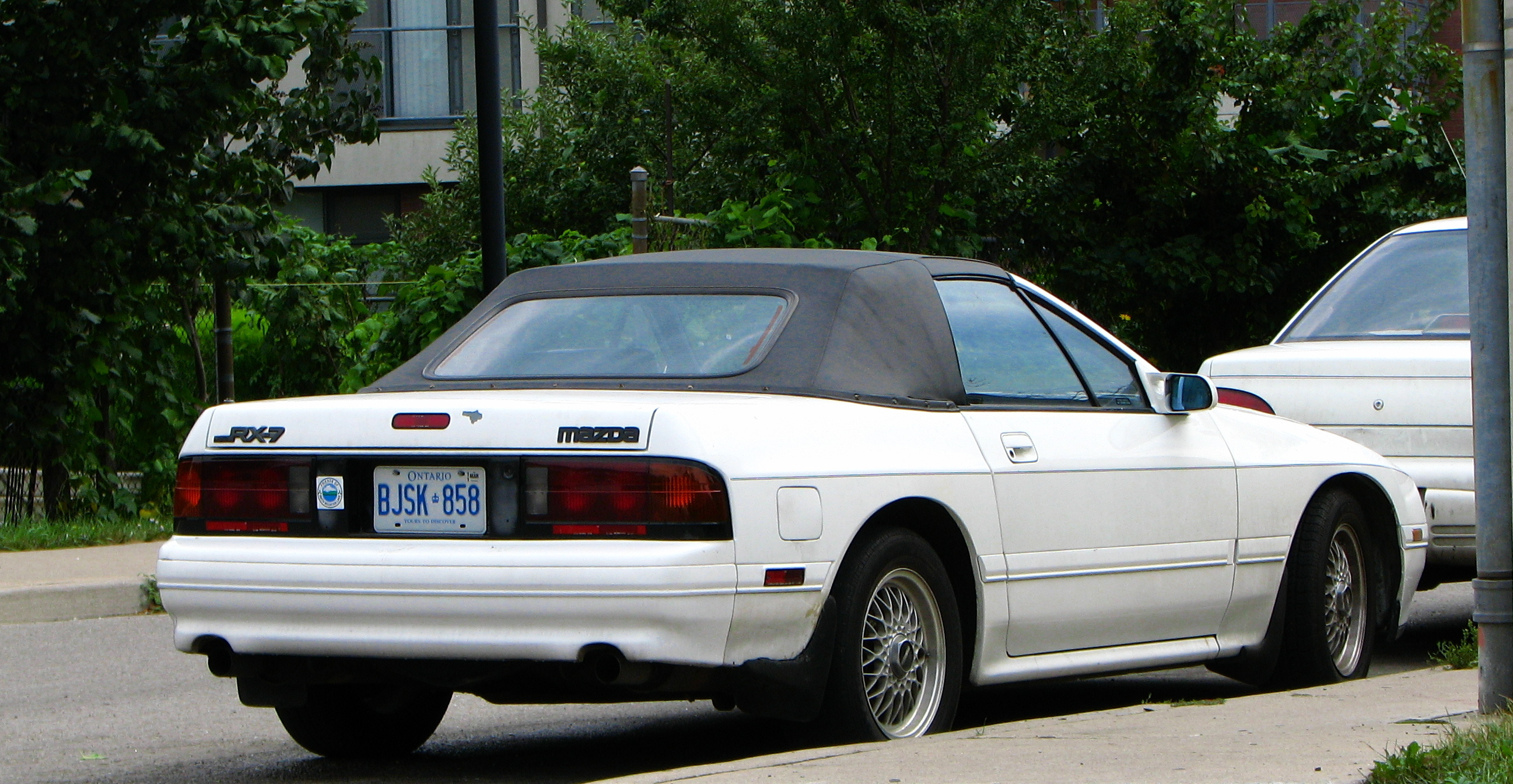 Mazda RX-7 Convertible